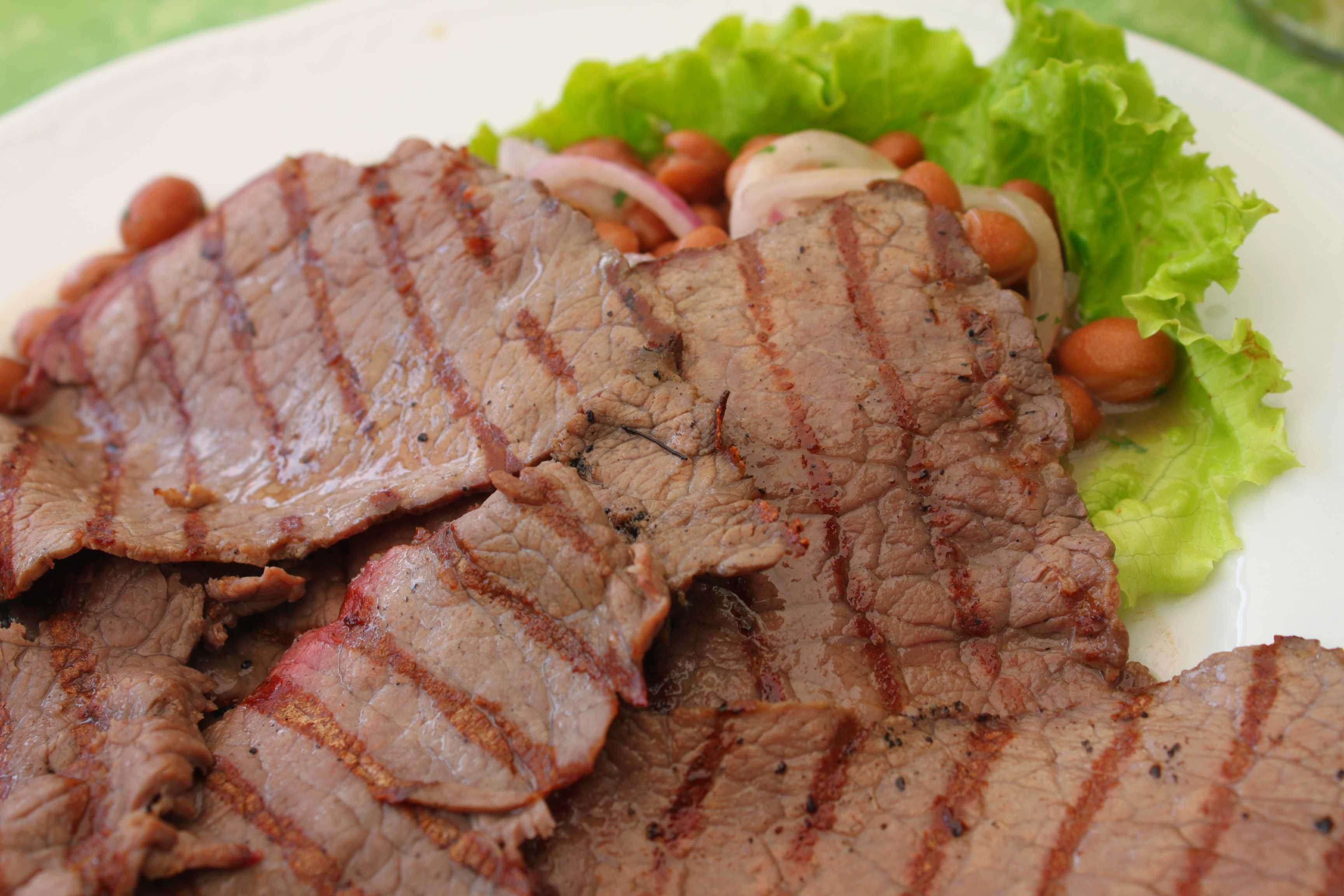 Carne Salada e fasoi ist ein gepökeltes Rindfleisch, gegrillt, mit Bohnen und Zwiebeln